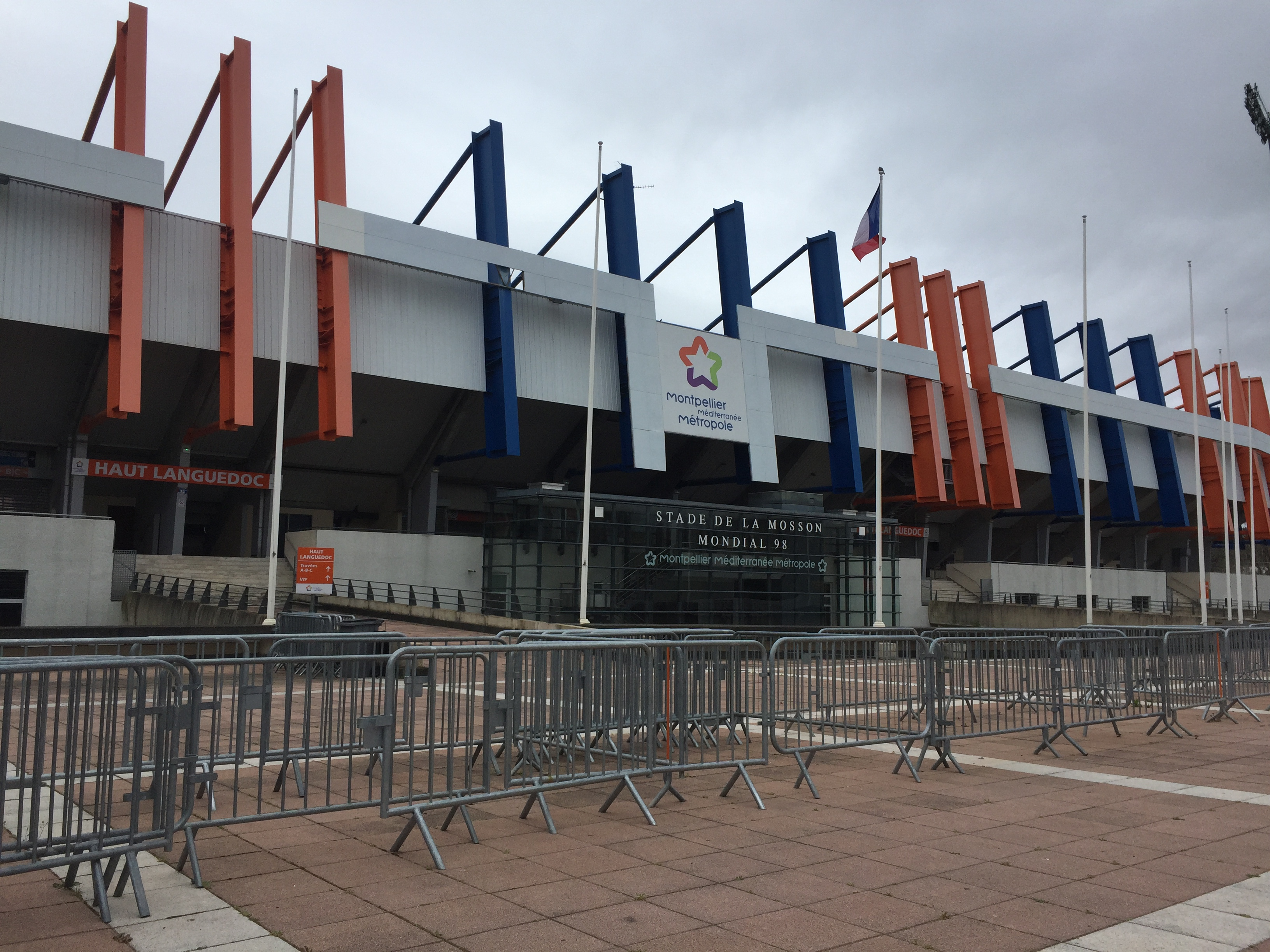 Stade de la Mosson